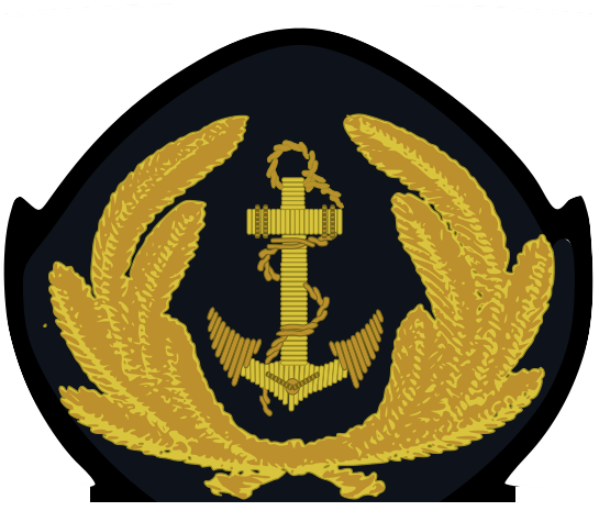 macaron